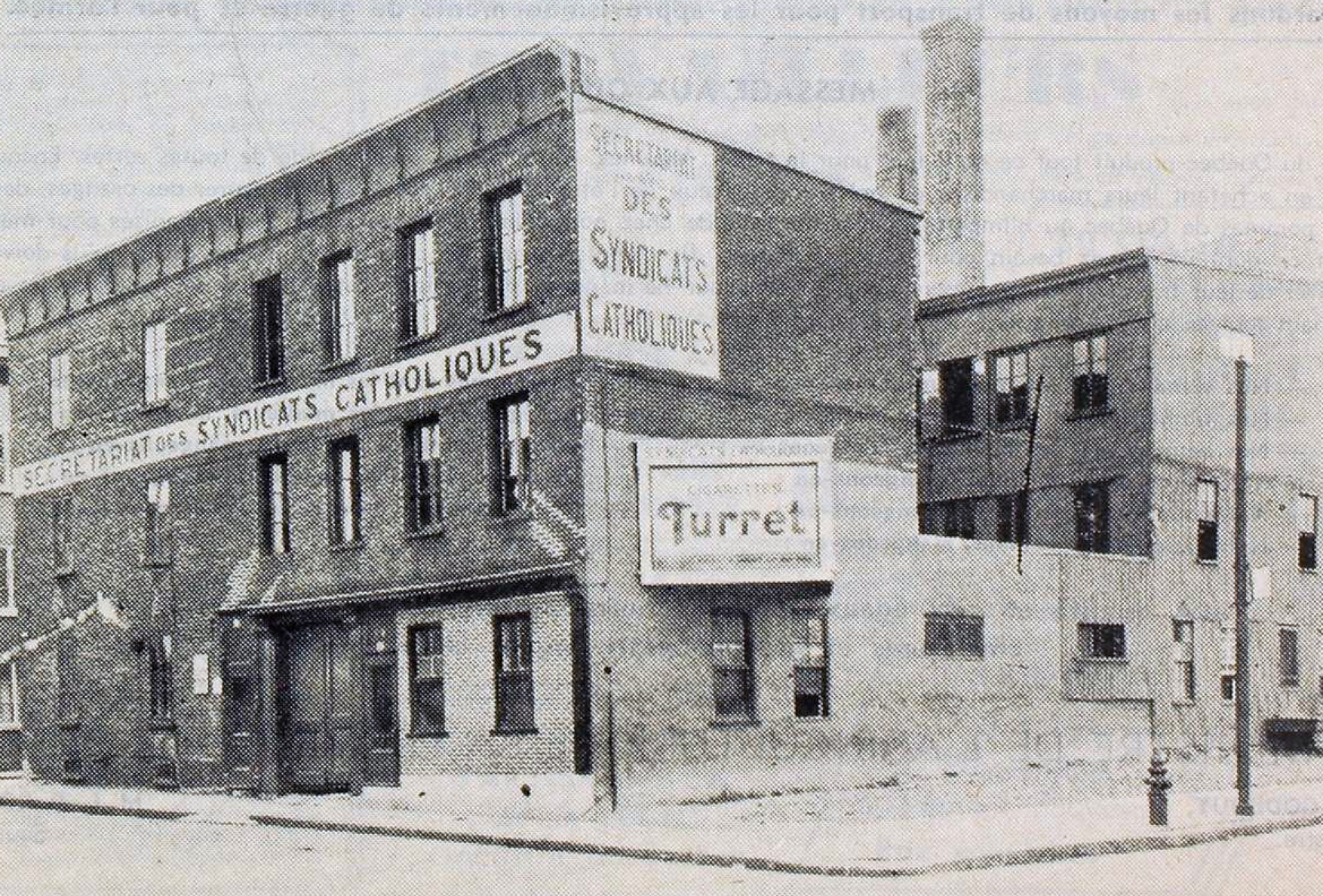 Locaux du Secrétariat des syndicats catholiques de Québec de 1933 à 1944, situé sur la rue Caron, dans Saint-Roch. Le Conseil général des syndicats catholiques de Québec y avait ses bureaux.